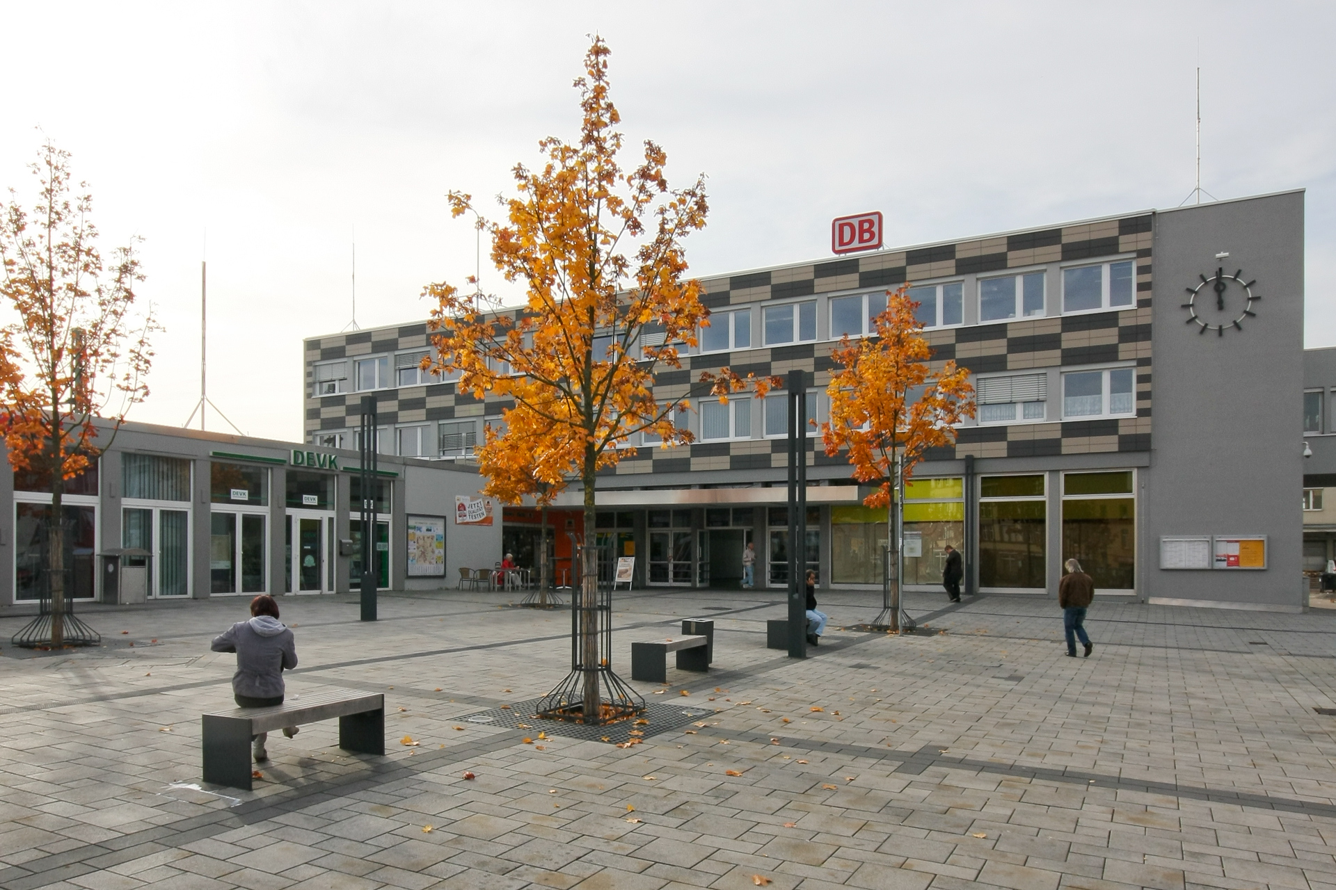 Eingang und Hauptgebäude des Bahnhofs Limburg an der Lahn